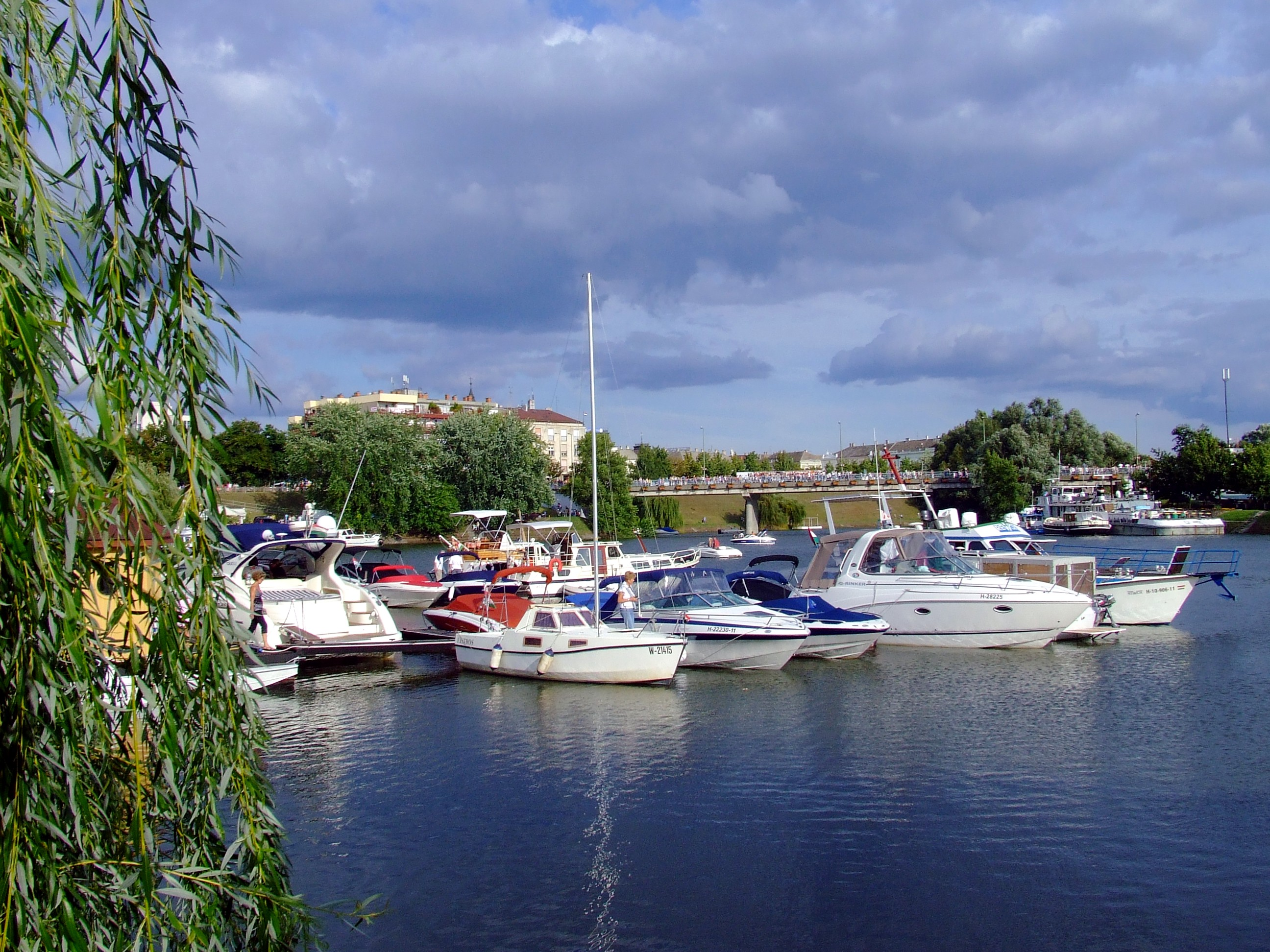 Jachtkikötő a Sugovicán (Kamarás-Duna, Baja, Bács-Kiskun megye)